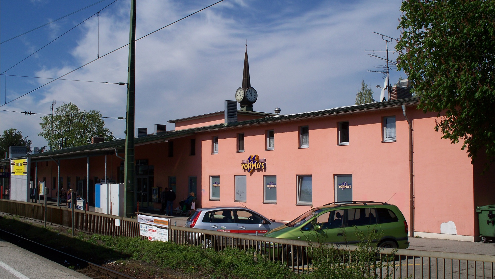 Der Bahnhof von Freising.